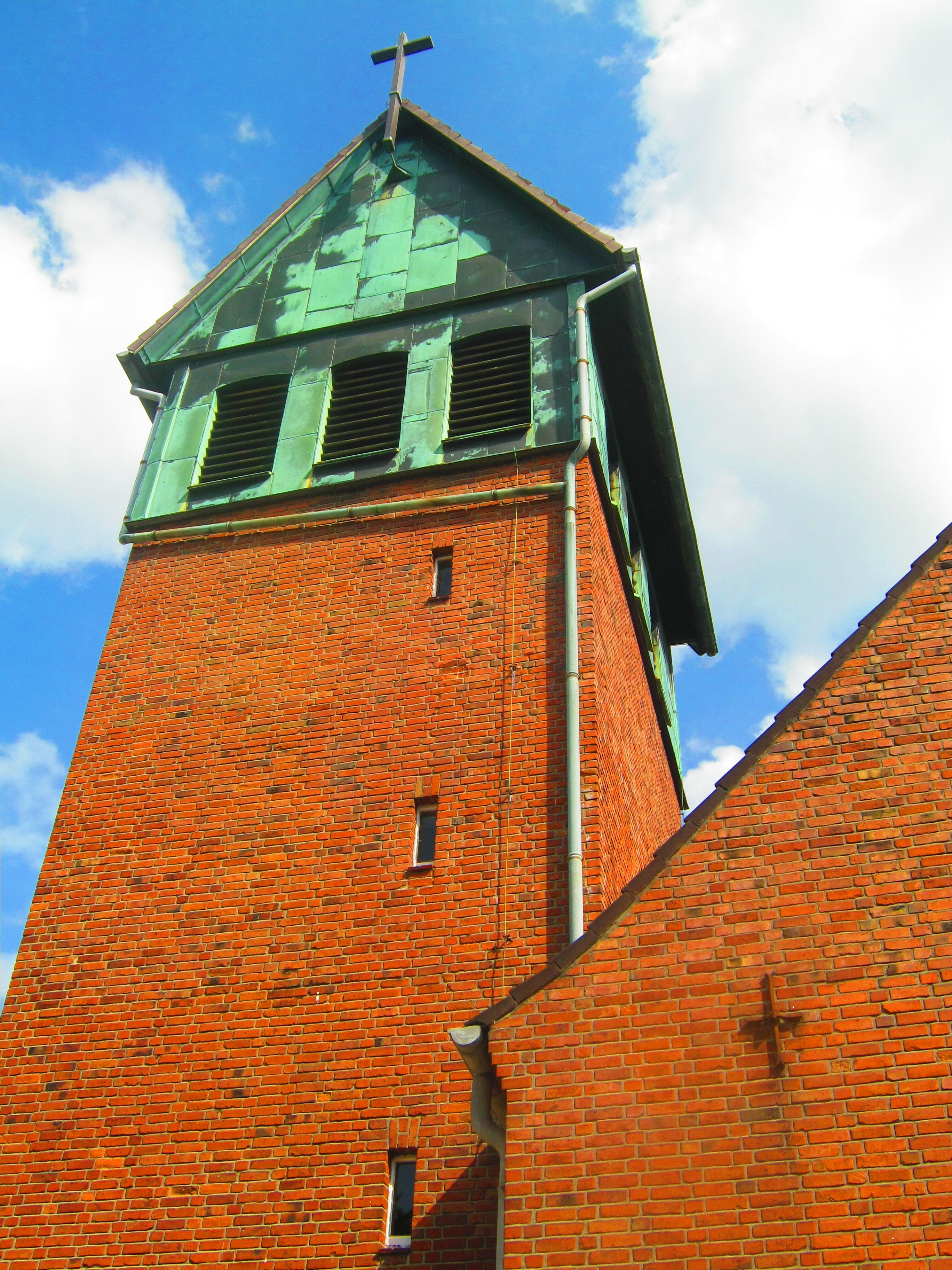 Advents-Kirche Kriegerdankweg in Hamburg-Schnelsen.